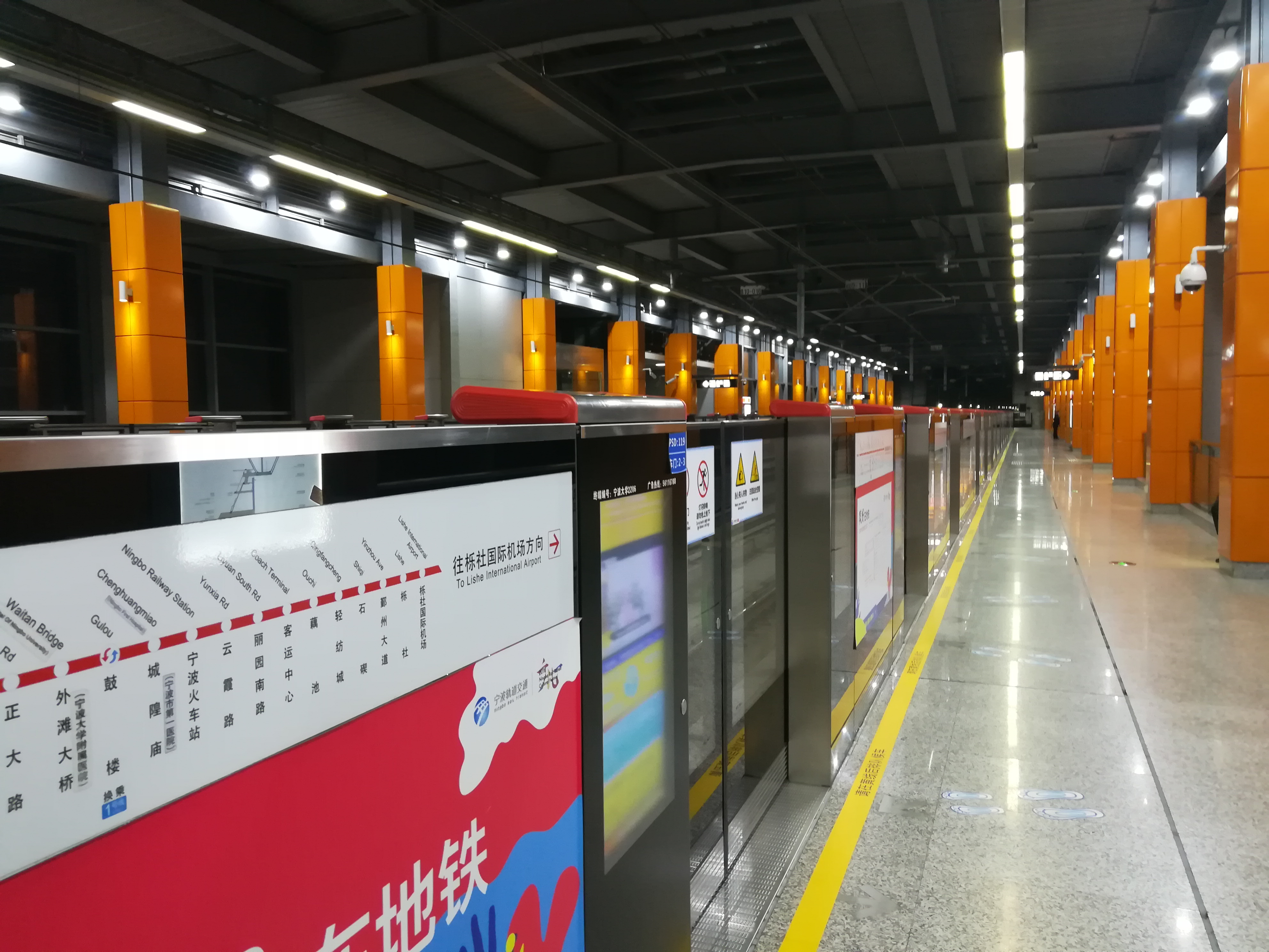 中文（中国大陆）: 宁波大学地铁站